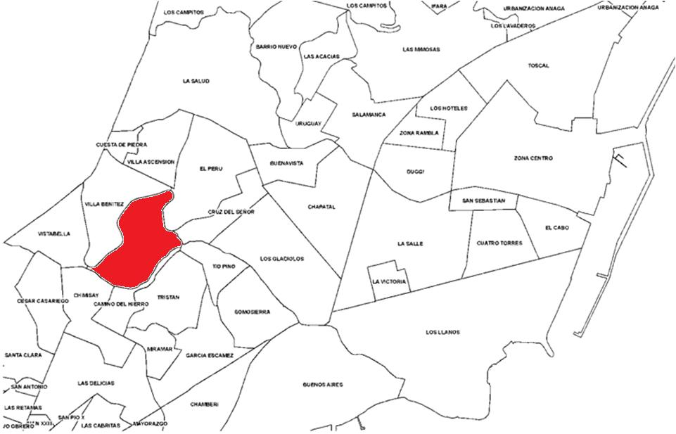 Localización del barrio